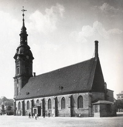 Johanniskirche in Leipzig vor dem Umbau durch Hugo Licht.